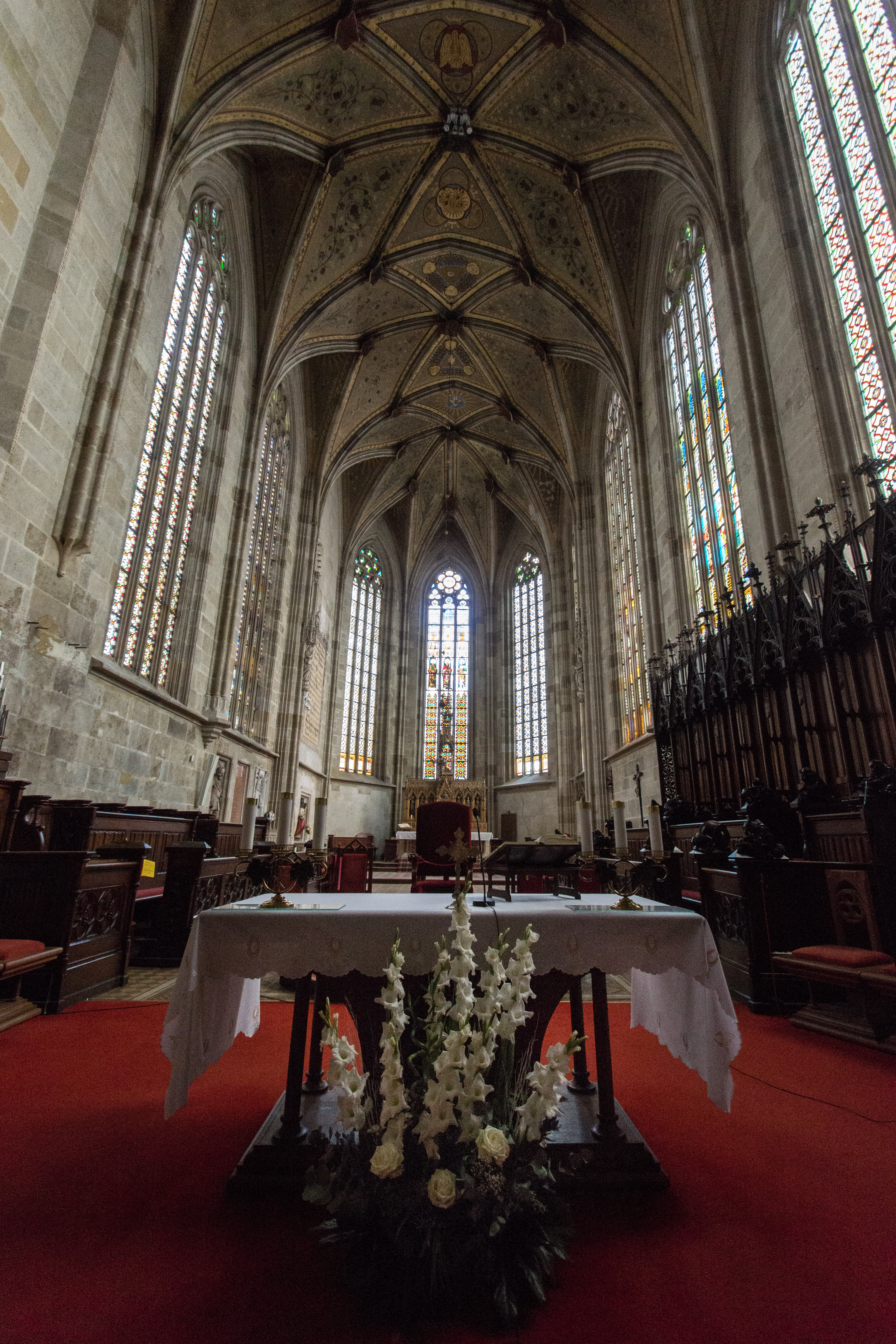 Catedral de San Martin. Altar Mayor.